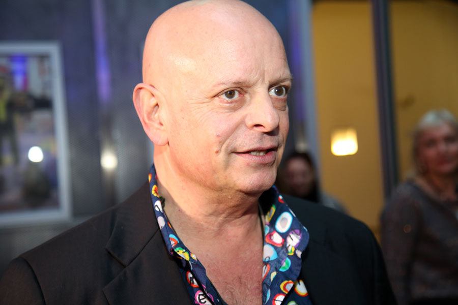 Lux.Gary-150401-5798